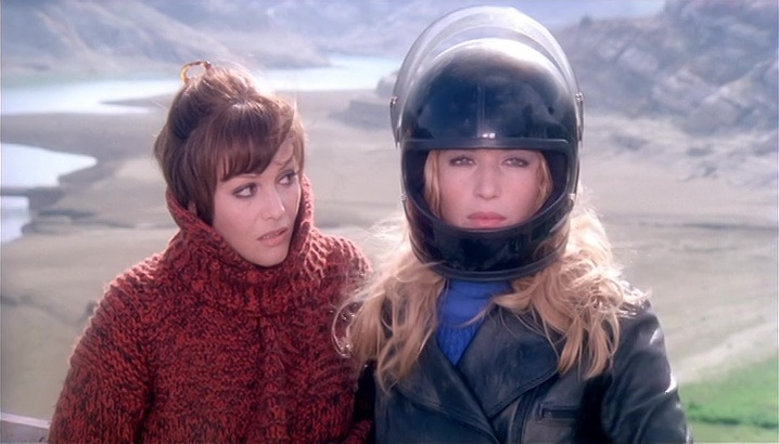 Scena del film Qui comincia l'avventura (1975)